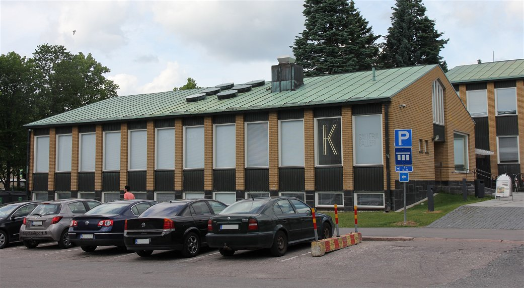 Galleria K, joka on saanut nimensä Mestari K:n (taidegraafikko Pentti Kaskipuro) mukaan, on Vantaan taidemuseon ja Vantaan taiteilijaseuran ylläpitämä taidegalleria Vantaan Tikkurilan kaupunginosassa. Galleria K toimii Vantaan kaupungintalon sivurakennuksessa.